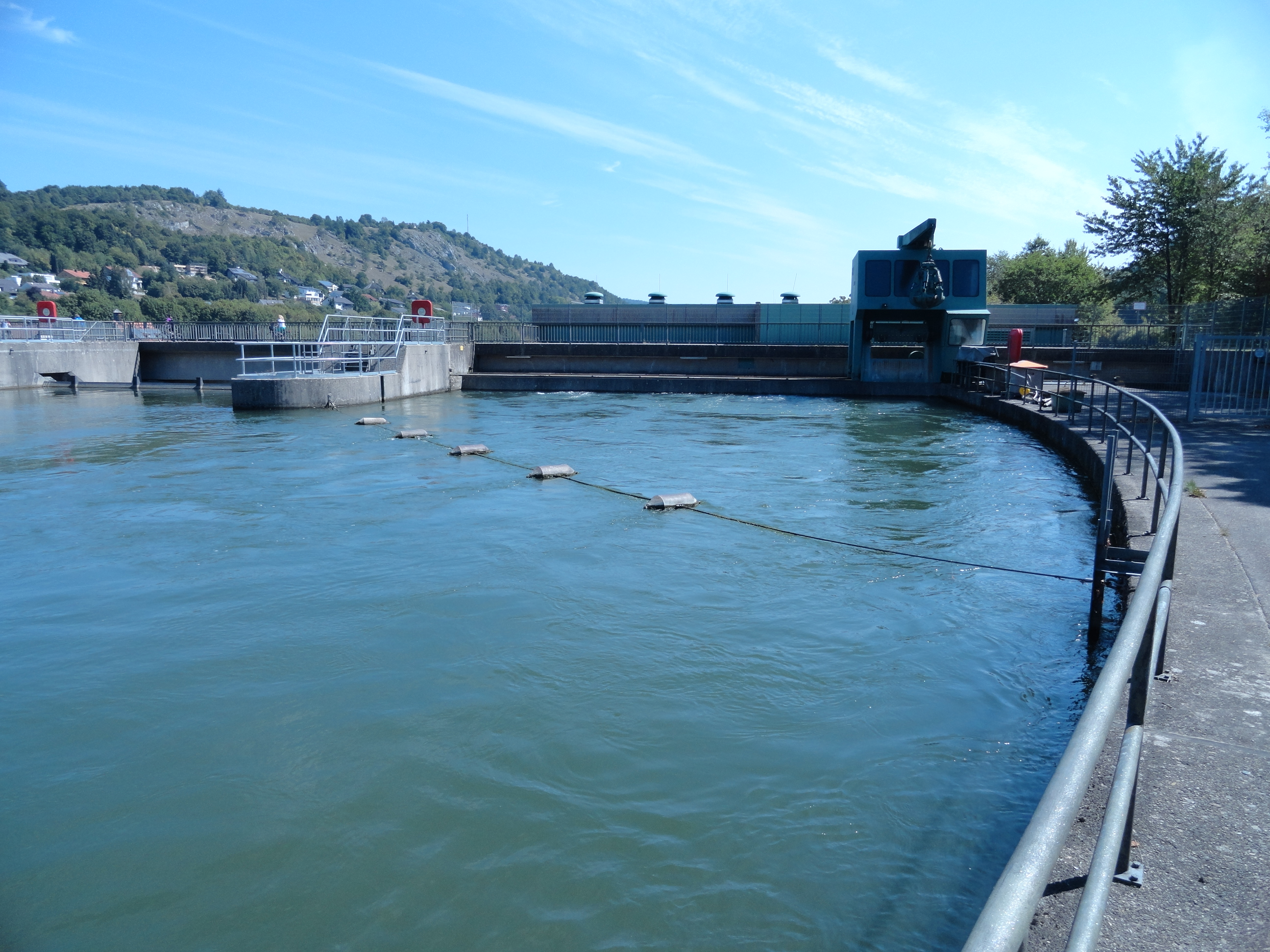 Staustufe Kelheim; Blick auf Kraftwerk/Pumpenhaus; zum Aufnahmezeitpunkt herrschte Pumpbetrieb